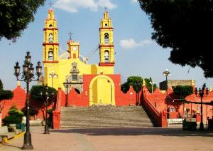 Parroquia de San Bernardino de Siena